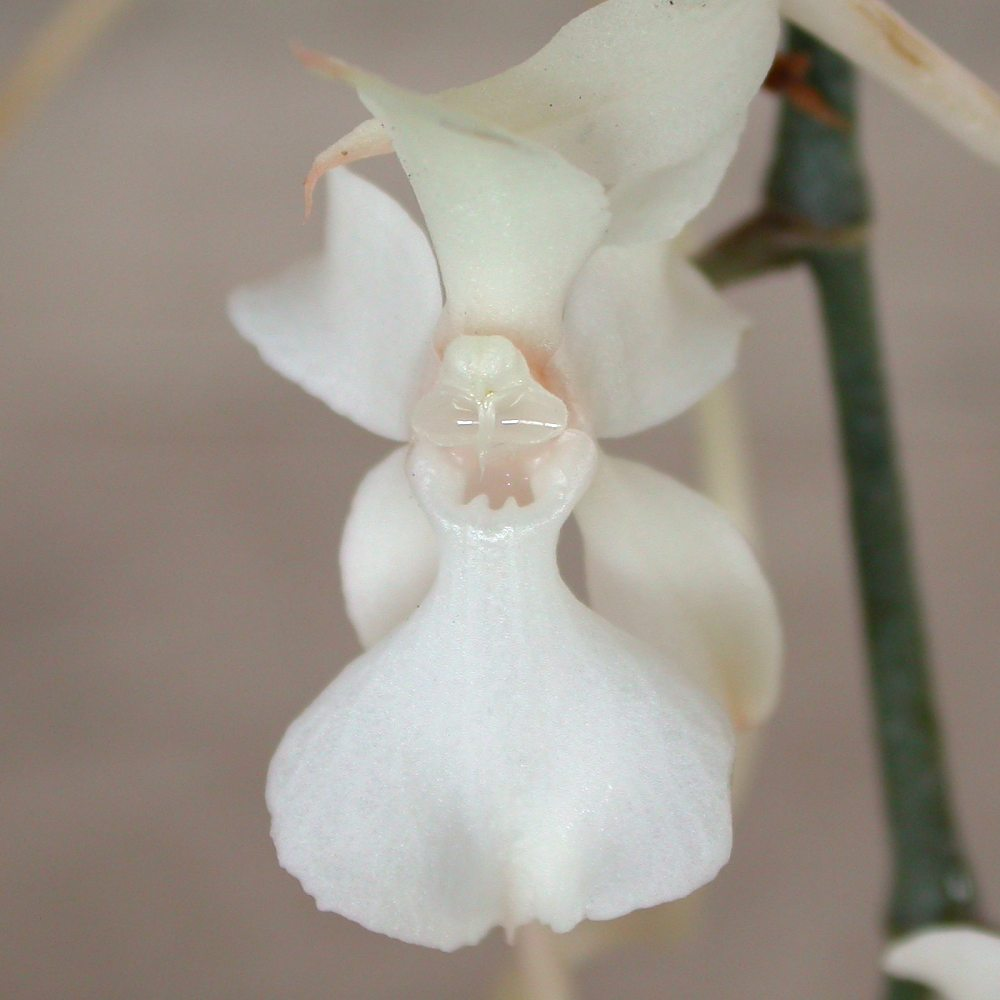 foto tirada em junho de 2002.